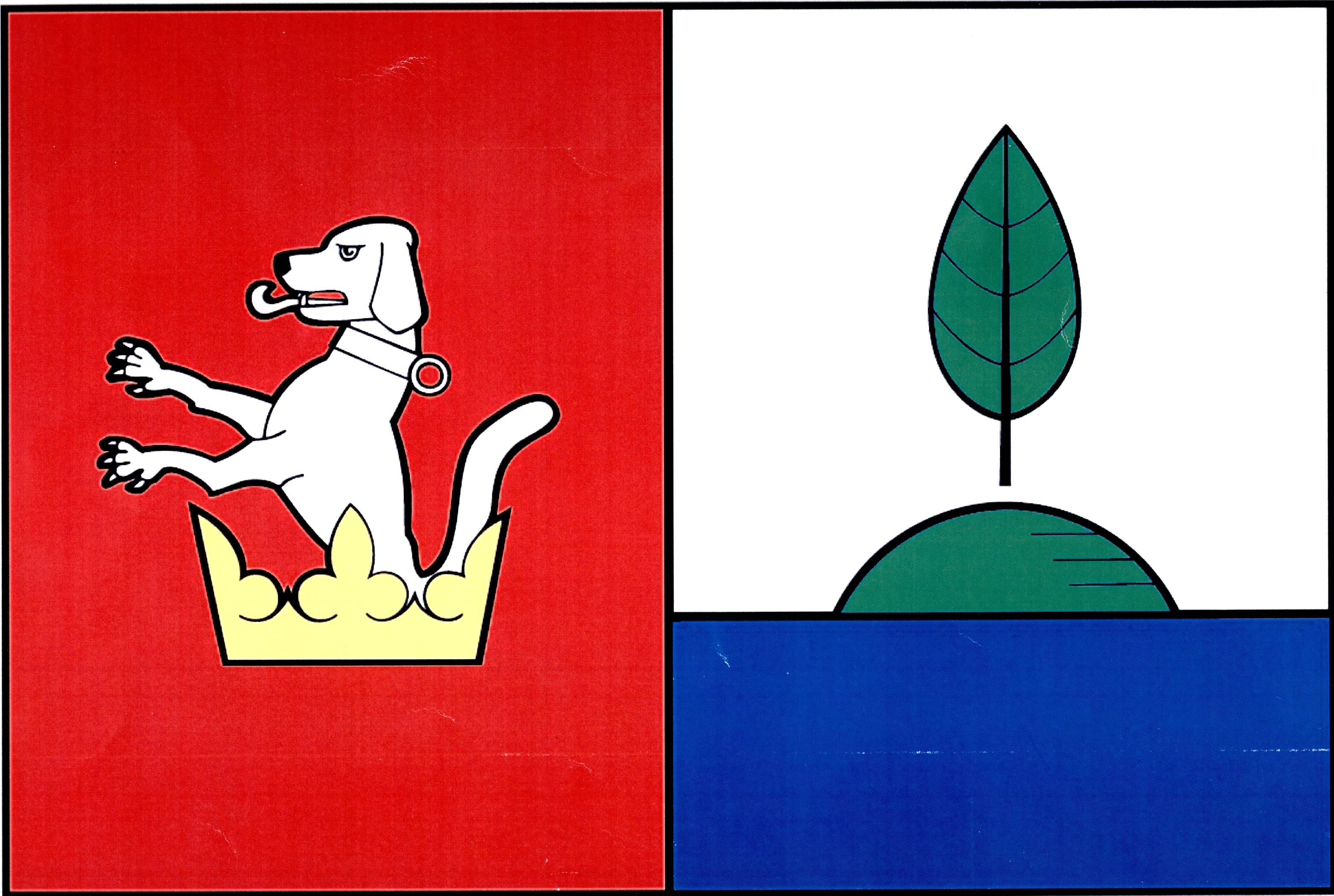 Vlajka obce Ostrov (okres Chrudim)